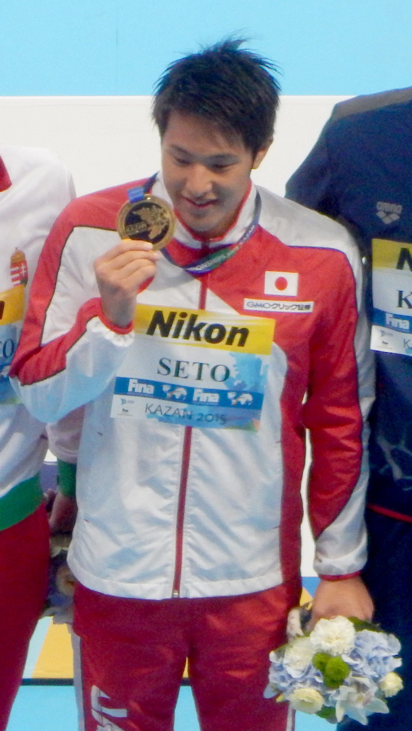 Медалисты чемпионата мира в Казани на дистанции 400 метров комплексом у Мужчин